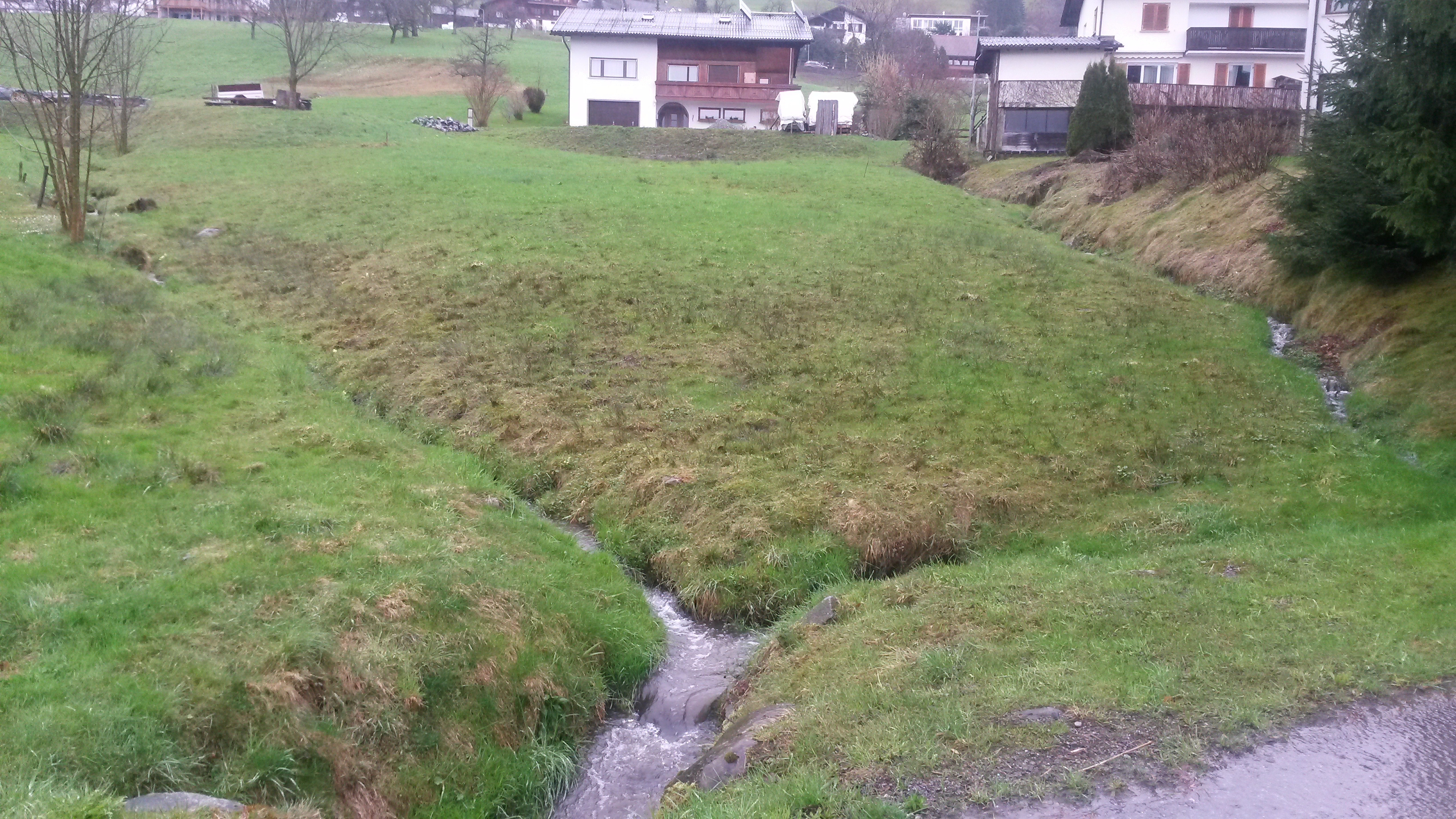 Bantlingergraben in Dornbirn, Vorarlberg, Österreich bei Gewässerkilometer 0,545.